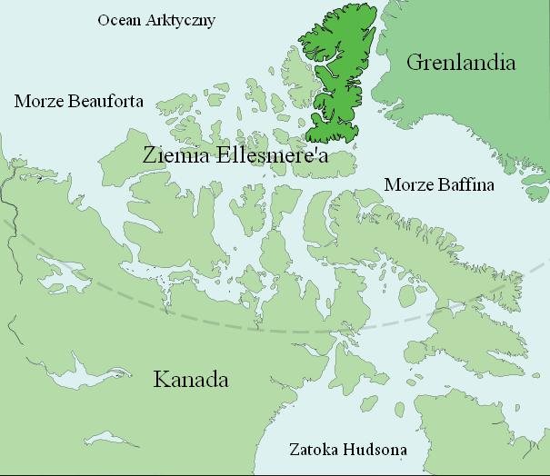 Ziemia Ellesmere'a (Kanada)